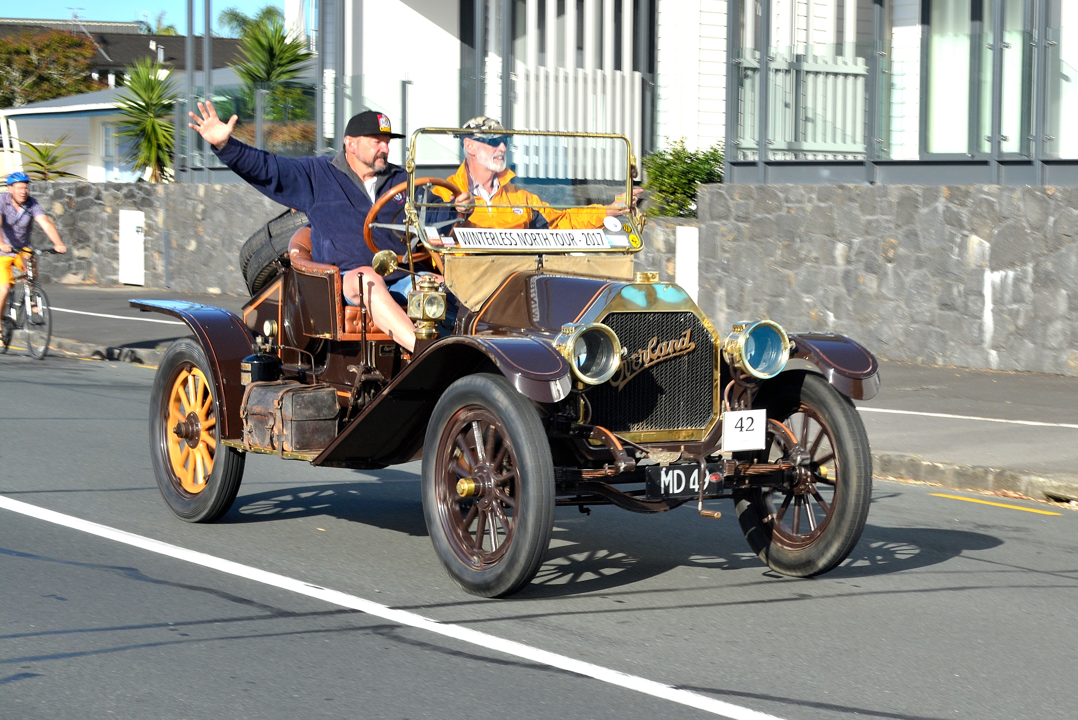 At Devonport,New Zealand